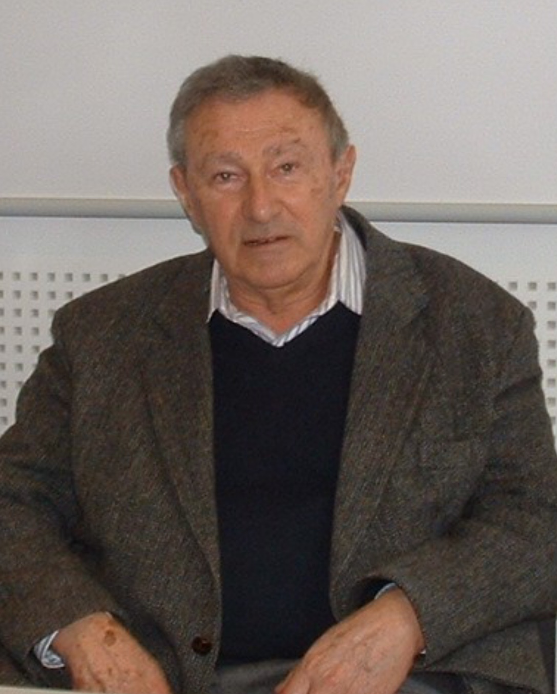 photo de profil de Serge Doubrovsky